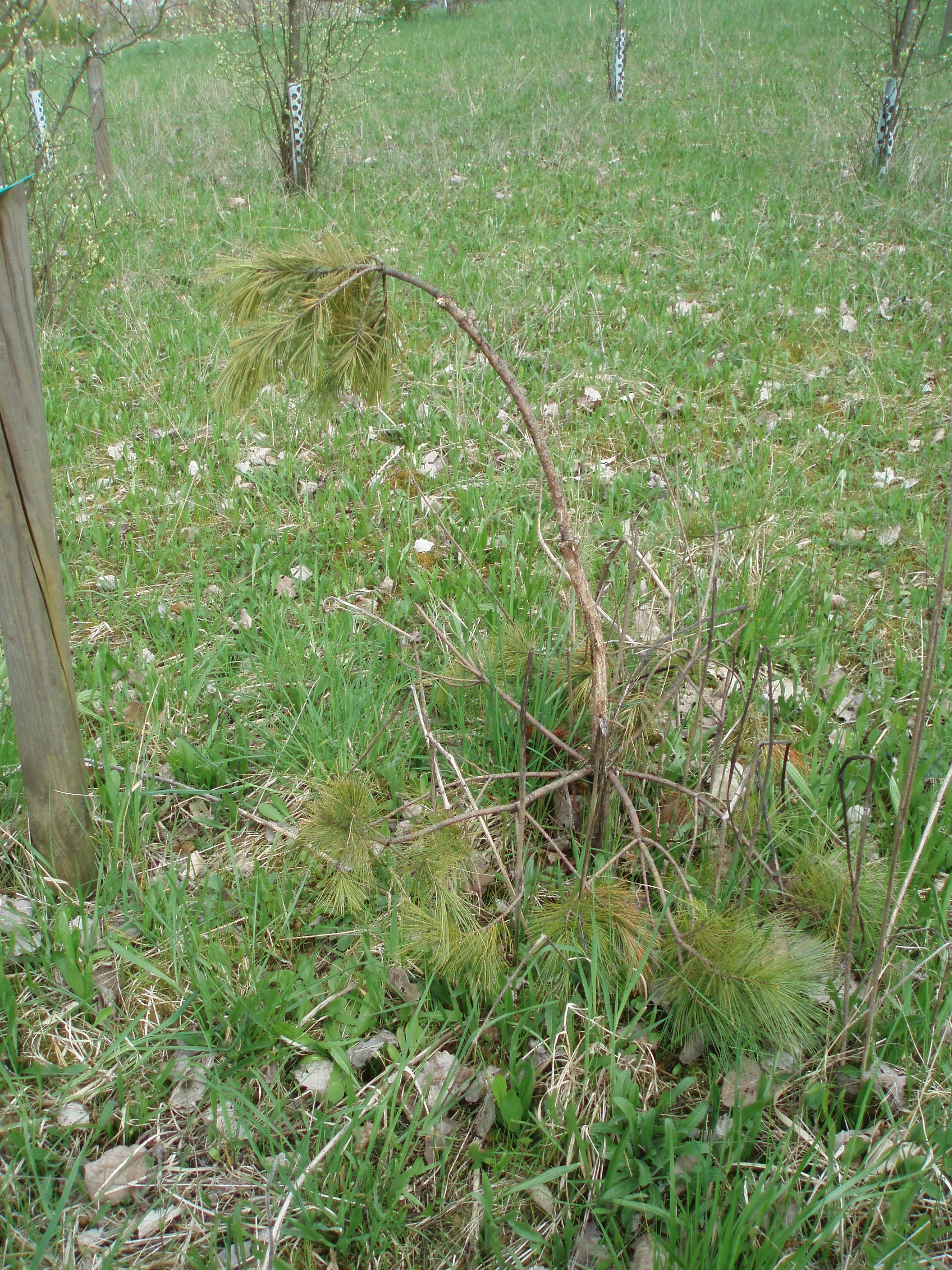 Grünes Labor Coburg, Weymouths-Kiefer (Pinus strobus), geschädigt durch Wildverbiss